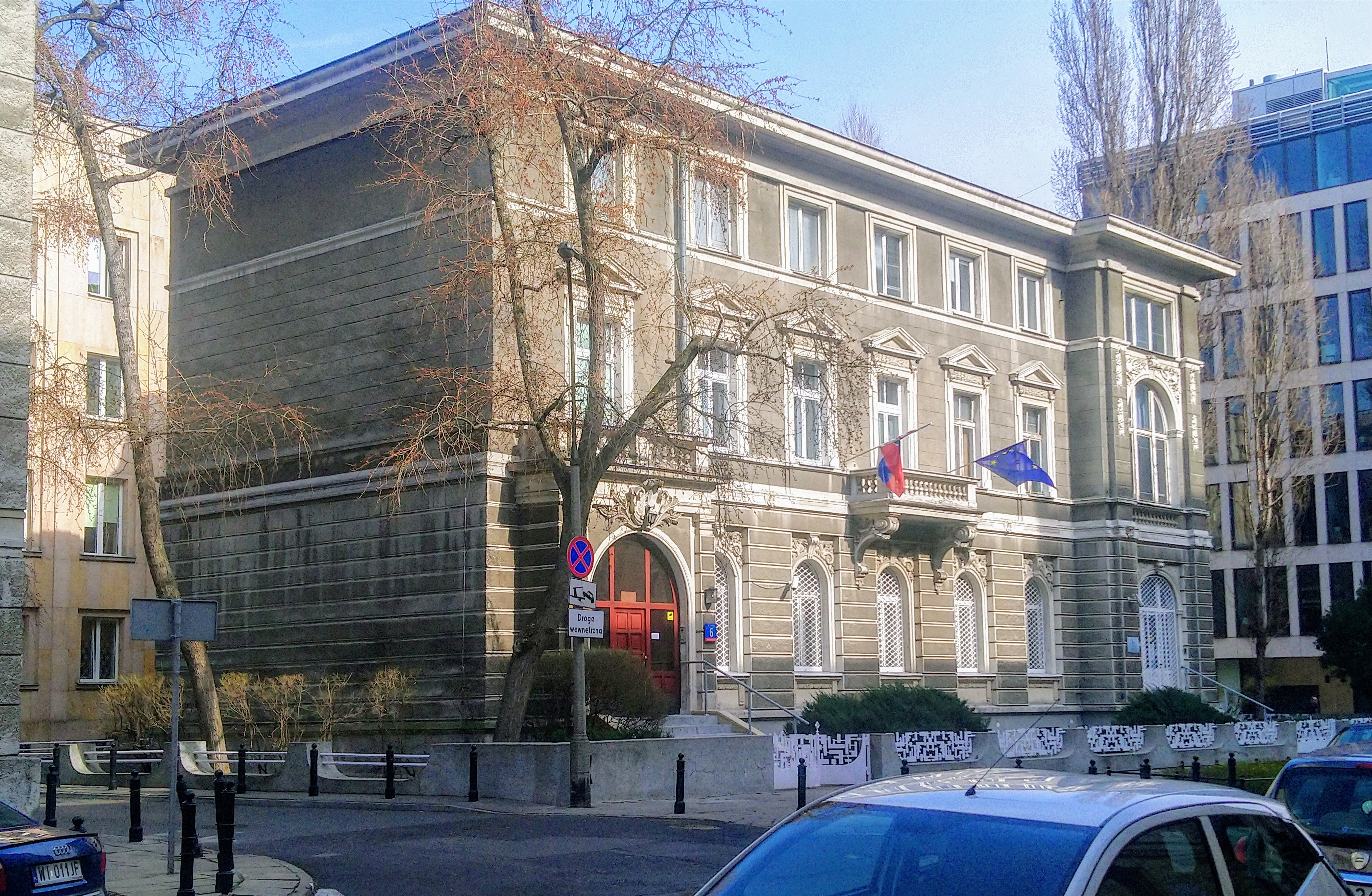 Ambasada Słowacji